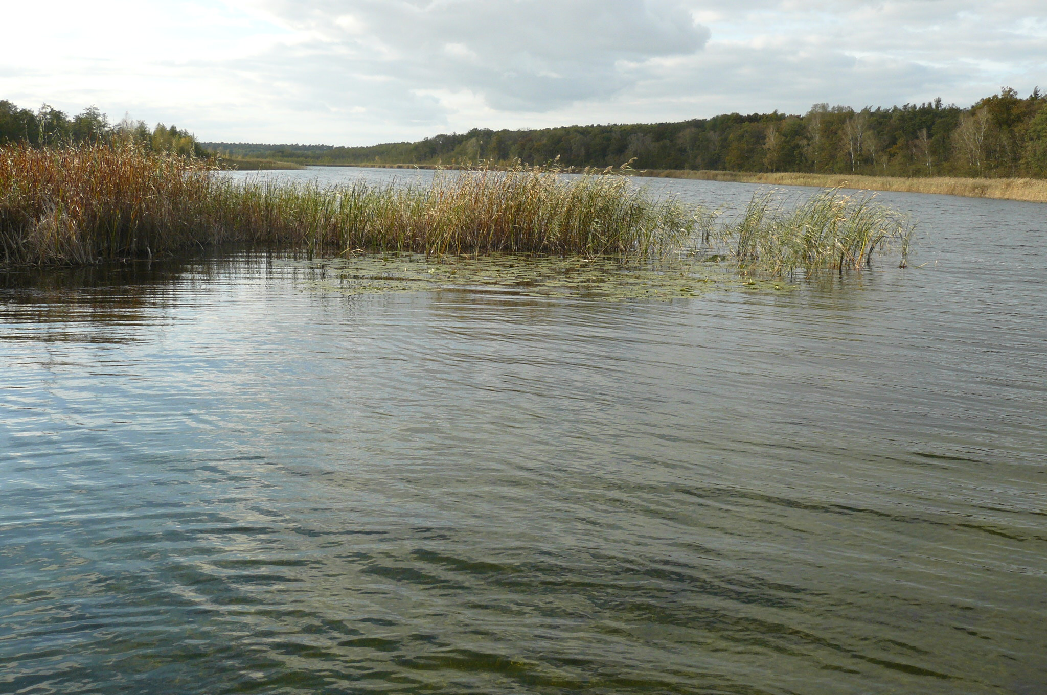 Jezioro Wielkowiejskie, gm. Stęszew.